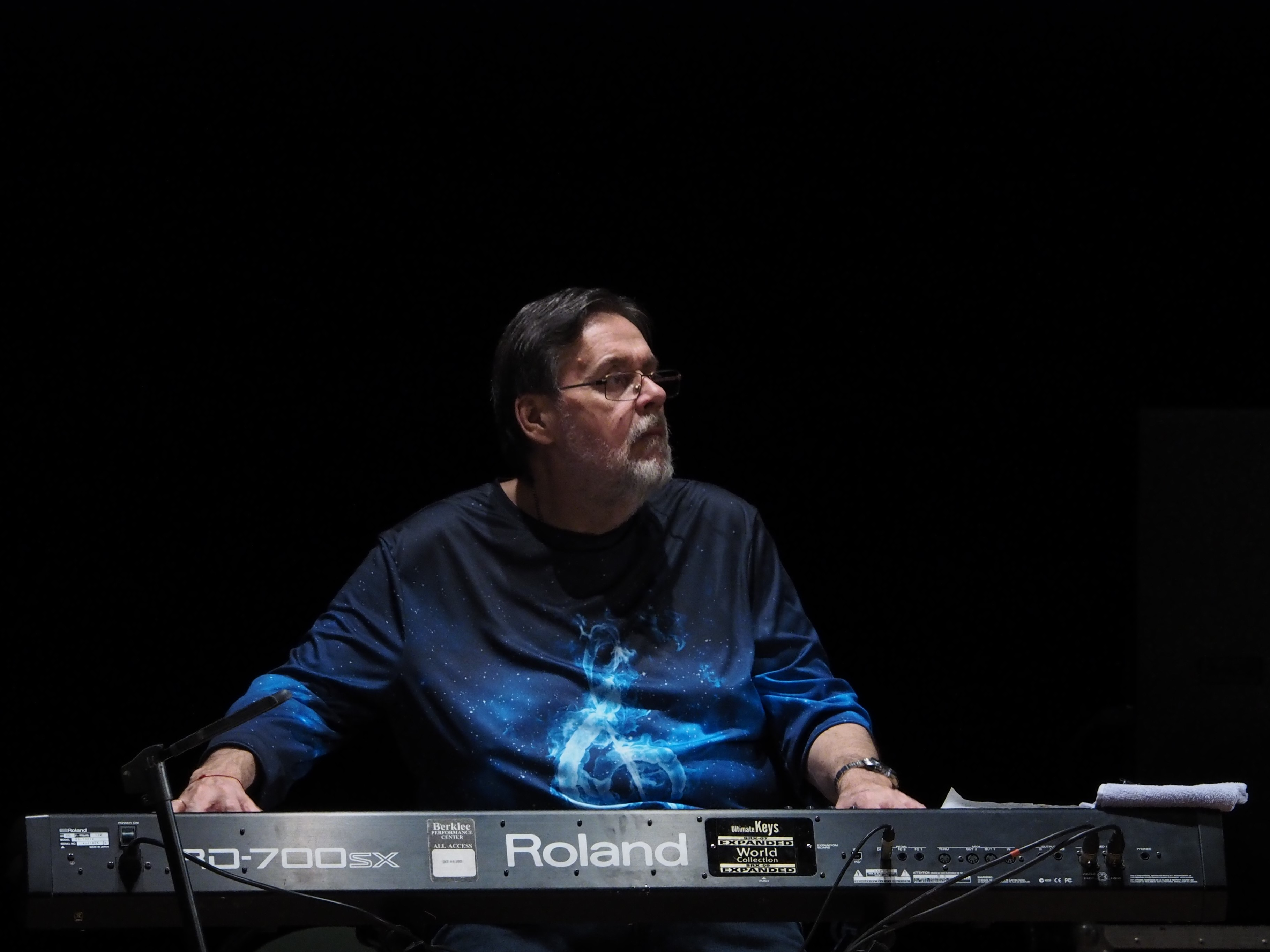 Юрий Константинович Капетанаки на концерте в г.Королёв (Московская область), 14.02.2018 Фото сделано в доме культуры во время концерта Александра Розенбаума